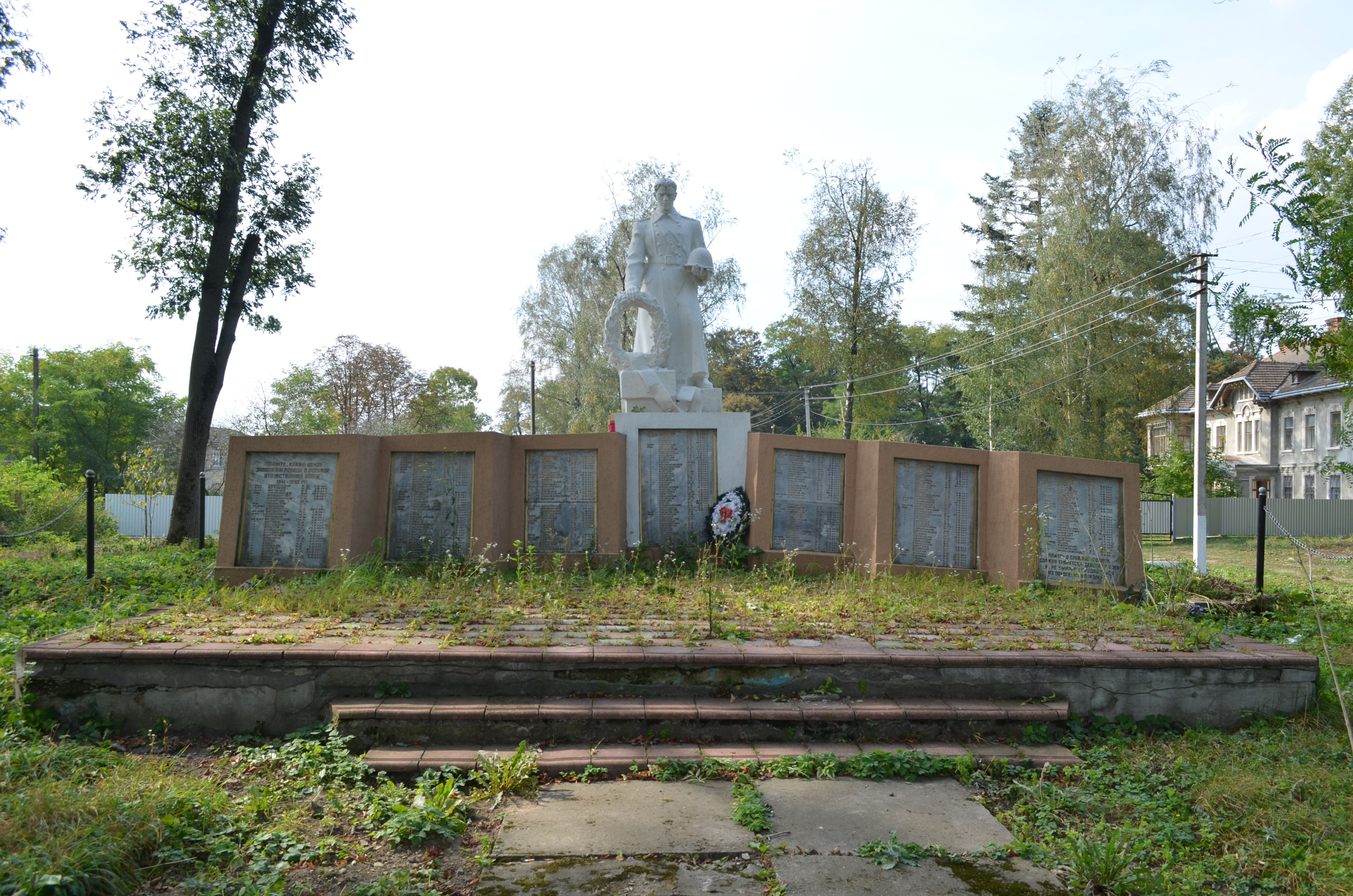 Братська могила радянських воїнів (пам., 1965, мармурова крихта), с. Надиби, парк